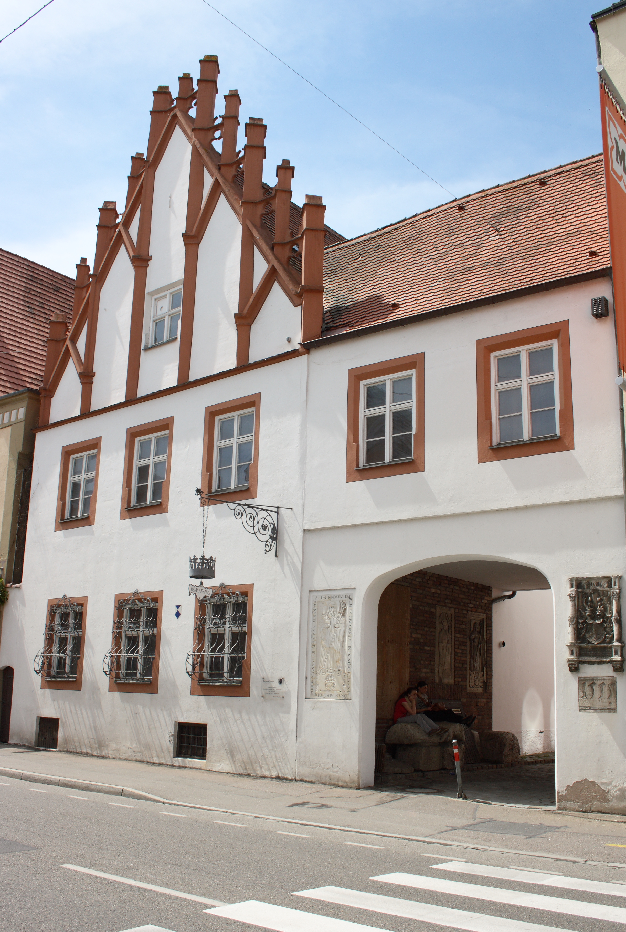 St. Agnesklosters (heute Heimatmuseum) in Lauingen im Landkreis Dillingen an der Donau (Bayern), Herzog-Georg-Straße 57a